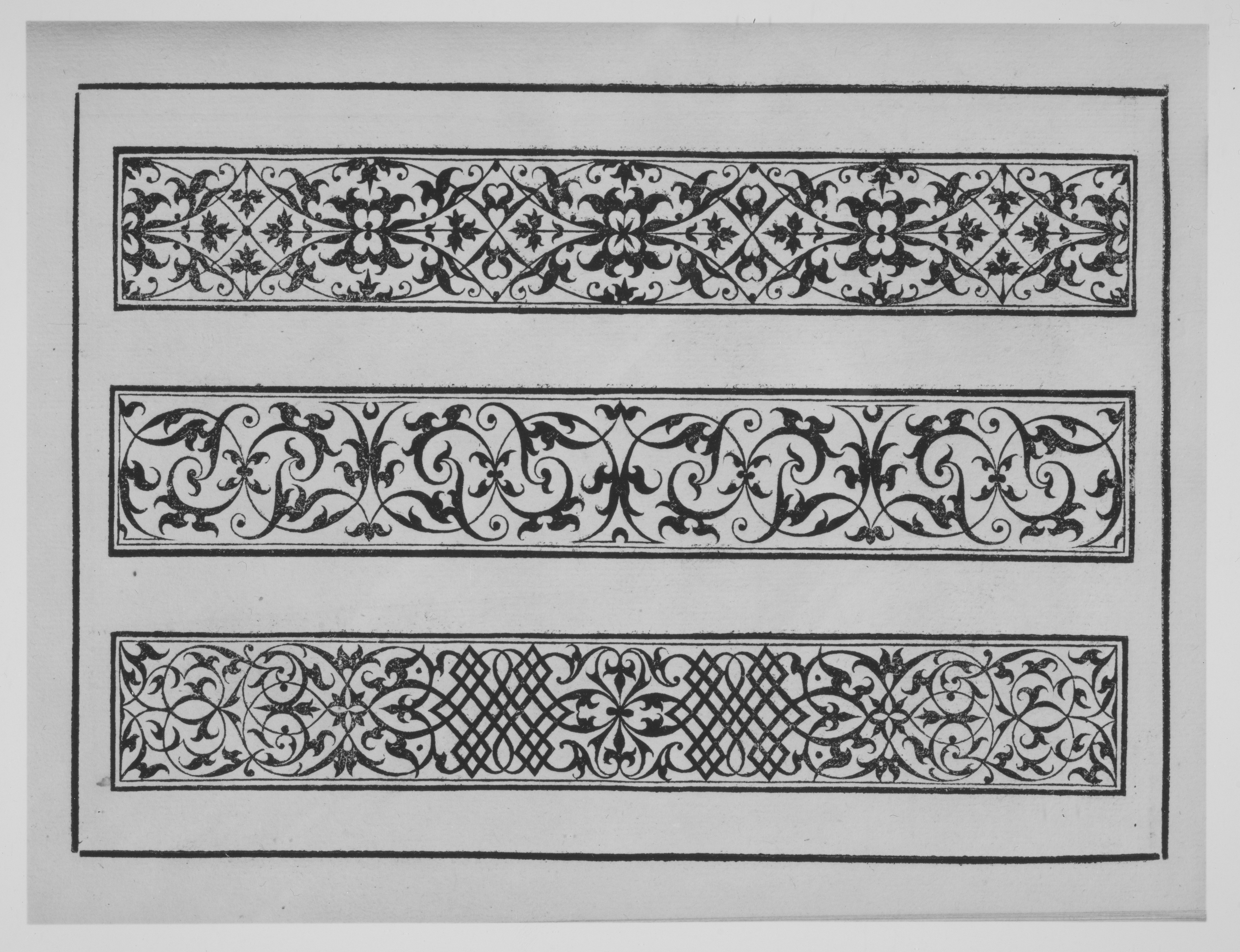 Book; Books